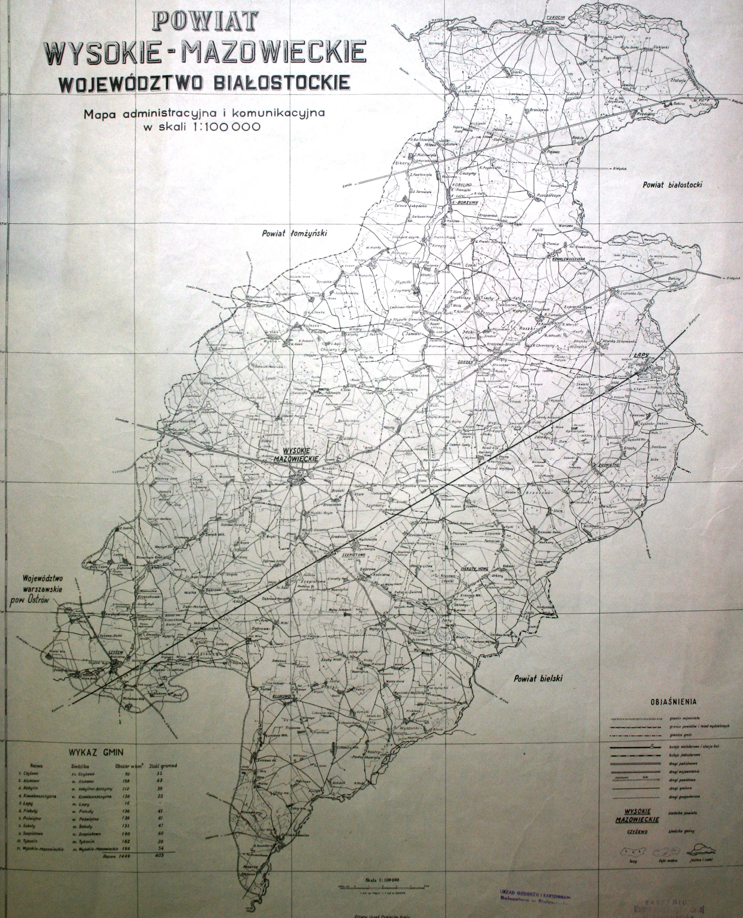 Jest to mapa administracyjna i komunikacyjna powiatu wysokomazowieckiego, województwo białostockie z 1948 roku, skala 1: 100 000. Szczegółowy opis znajduje się w publikacji: W. Jemielity, Podziały administracyjne powiatów wysokomazowieckiego i łapskiego w latach 1919–1990 z Studia Łomżyńskie, tom VII. Łomża 1996 r. s. 95-126.